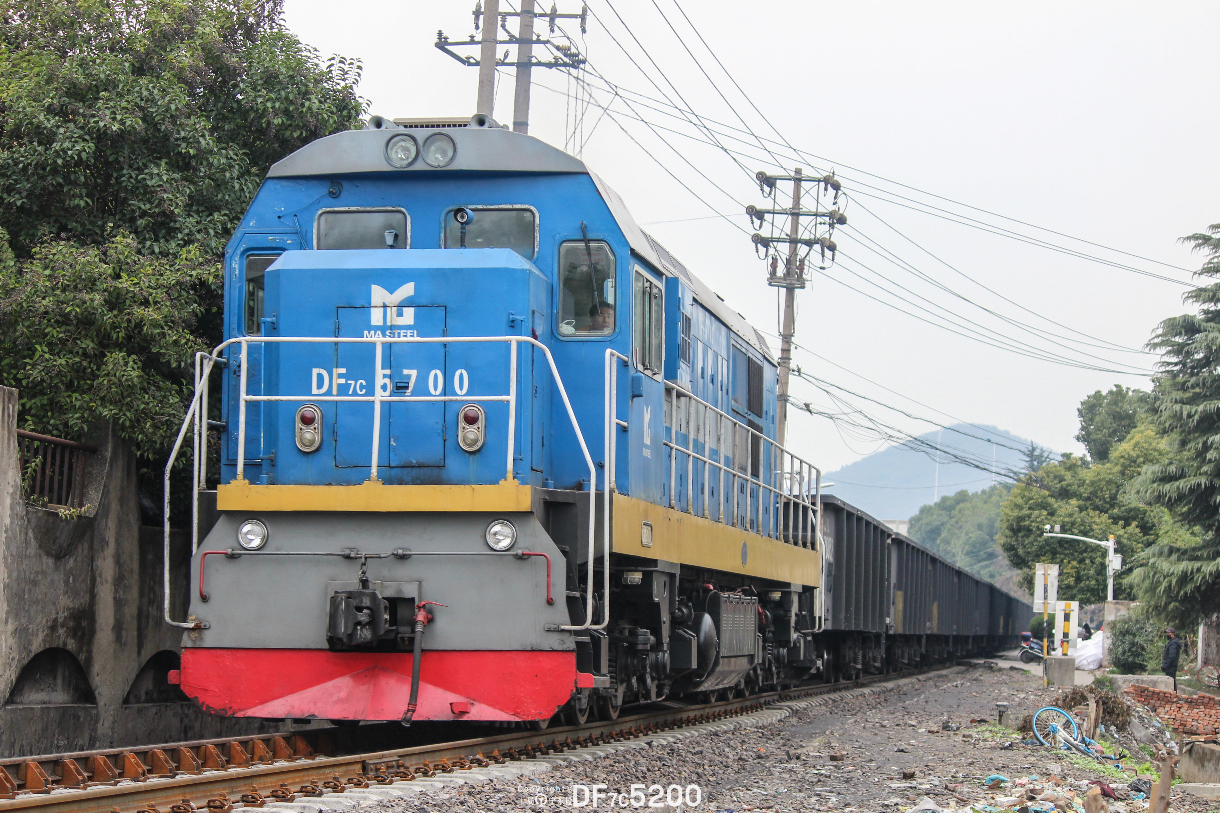 马钢集团的标准化DF7C型内燃机车正在进行调车作业